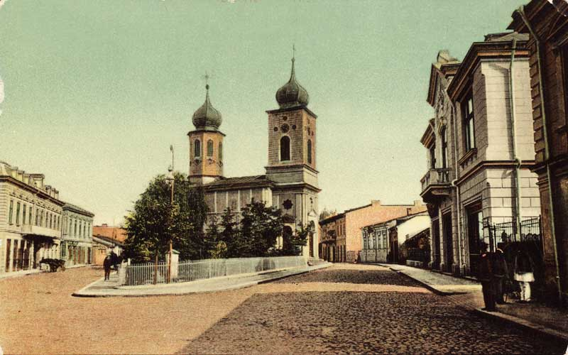 Biserica Sf. Nicolae Piteşti